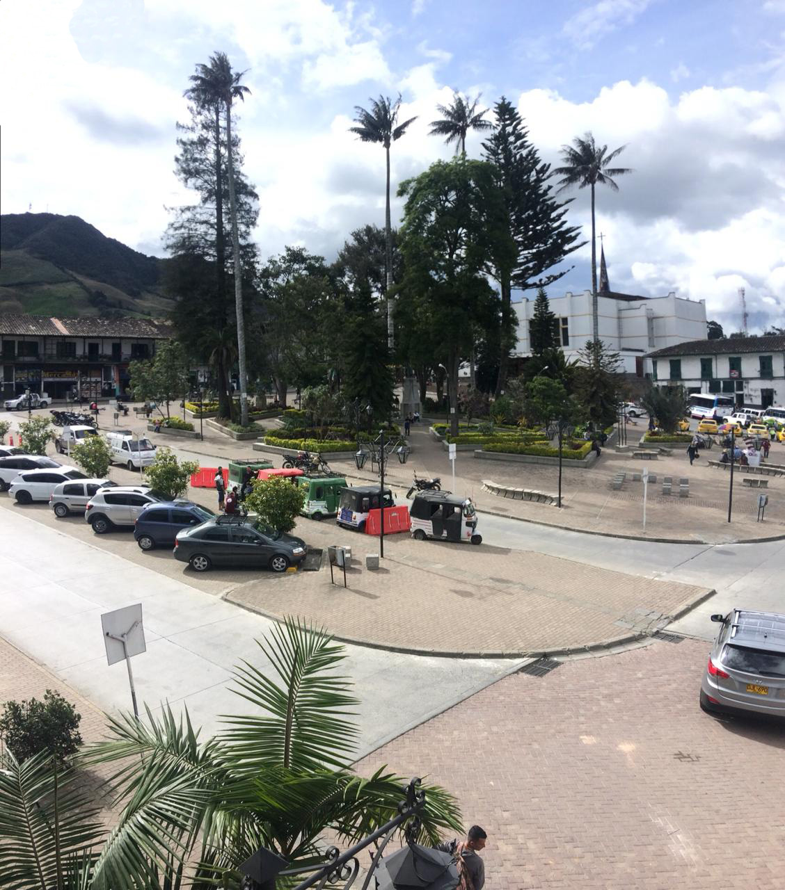 Foto general de la plaza de Ruíz y Zapata (Sonsón, Colombia)